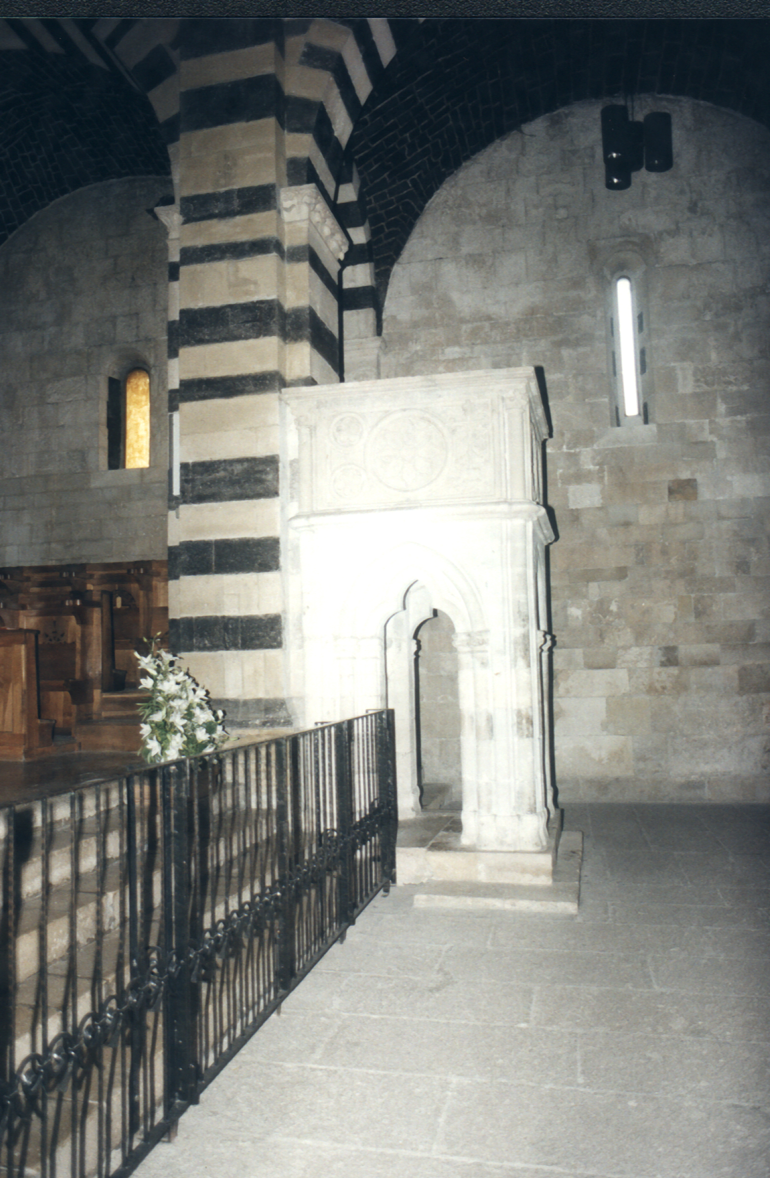 Ambone, Abazia di San Pietro di Sorres (XII secolo), Borutta (SS), Sardegna